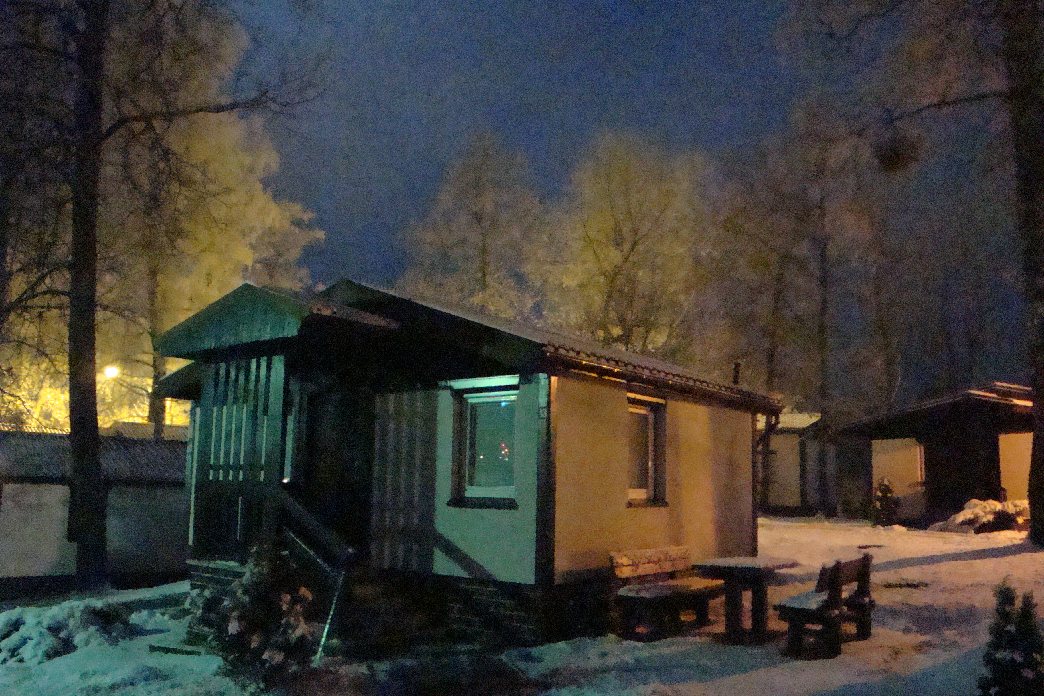 Wierzbowo, PWPW